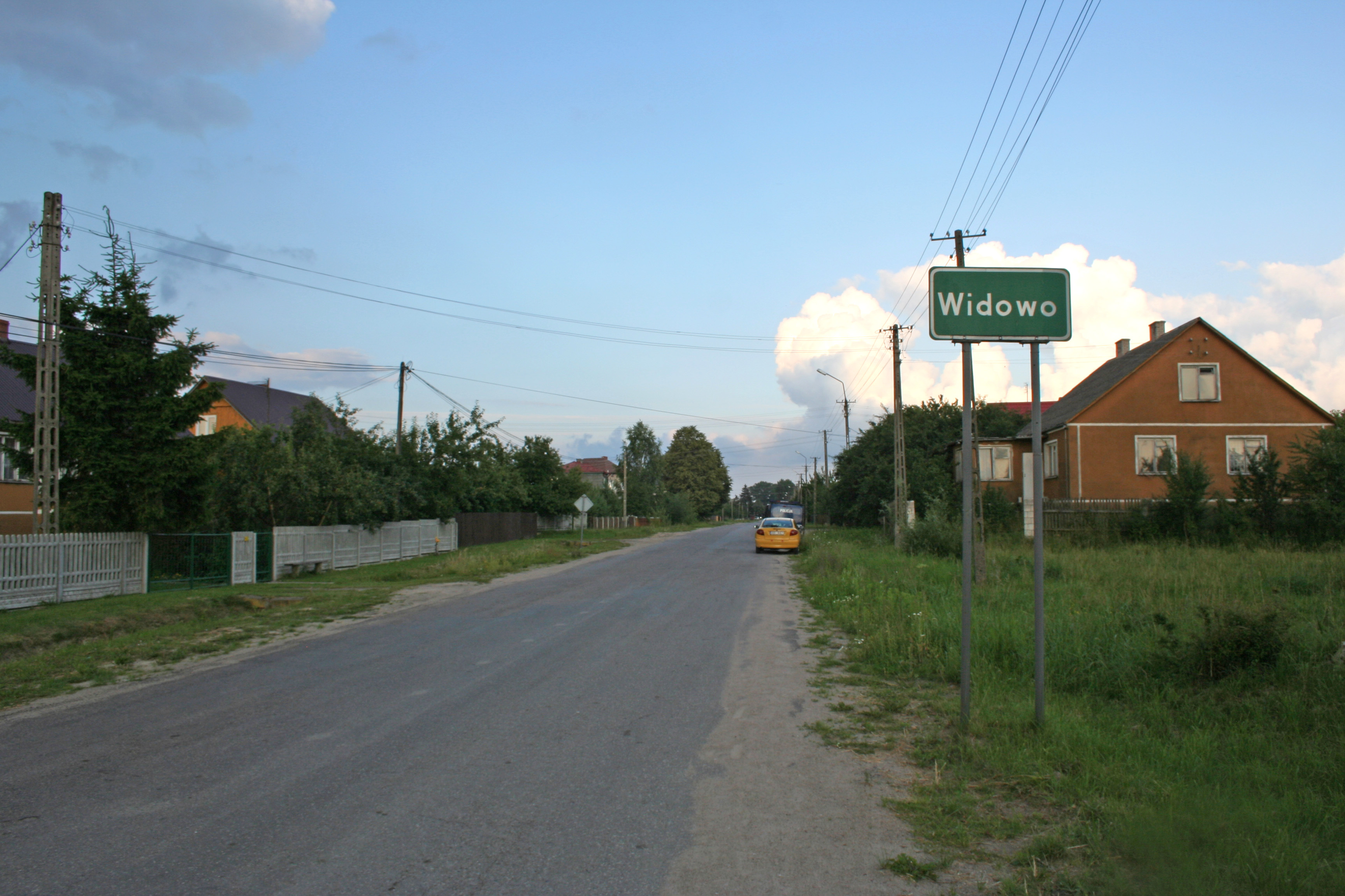 Droga wjazdowa do Widowa.